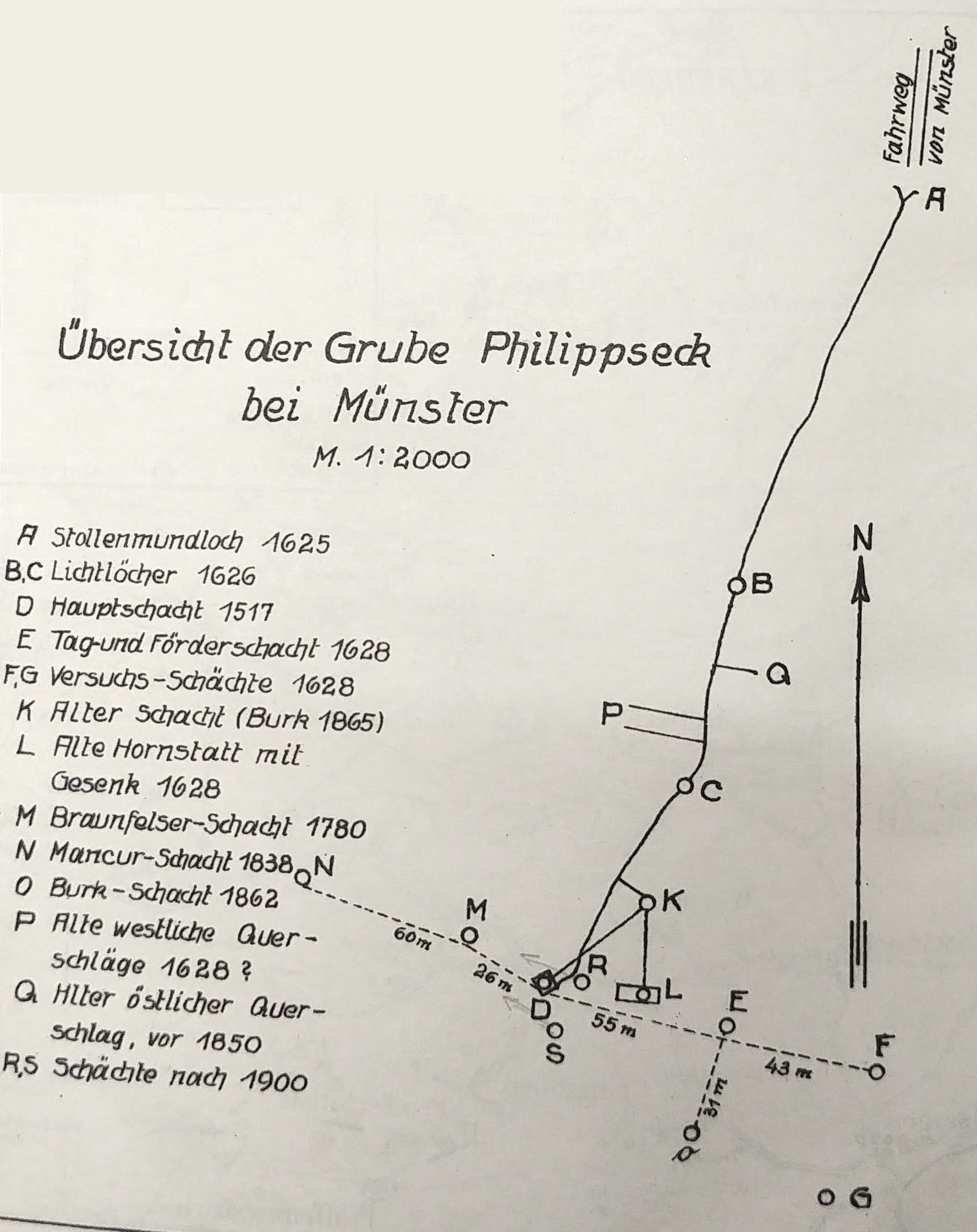 Plan der Grube Philipseck. Verlauf des Stollens und Lage der Schächte.